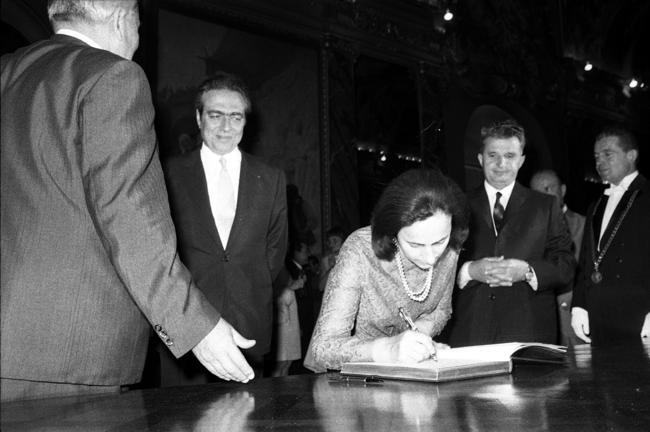 Mairie de Toulouse. Le 17 Juin 1970. Vue de Monsieur et Madame Ceausescu signant le livre d'or au Capitole.